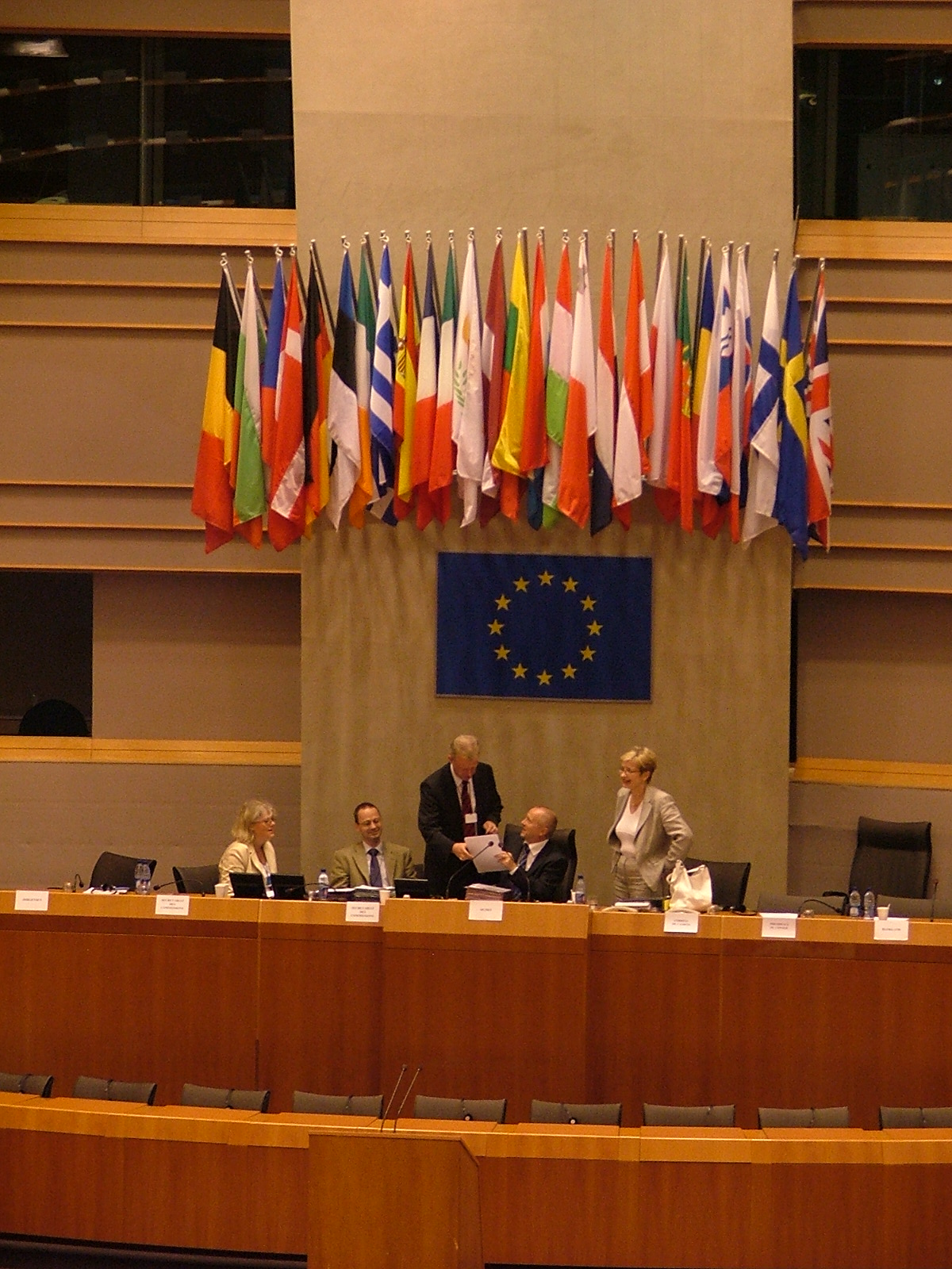 Belgium, Bruxelles - Brussel, European Parliament Pl: Belgia, Bruksela, Parlament Europejski